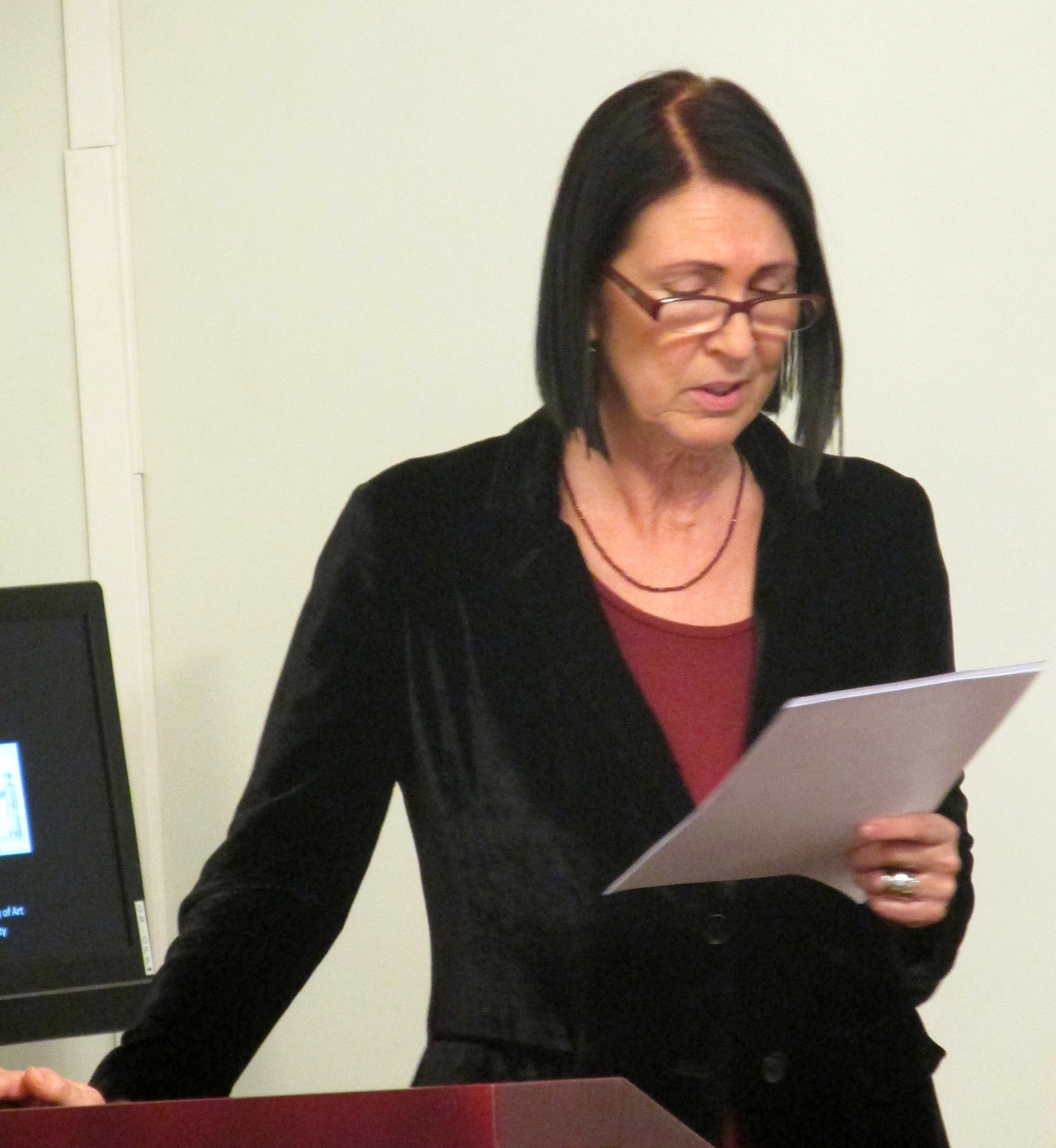 Kunstiajaloolane Krista Kodres esinemas toimunud seminaril "Läänemeri meets Ostsee".